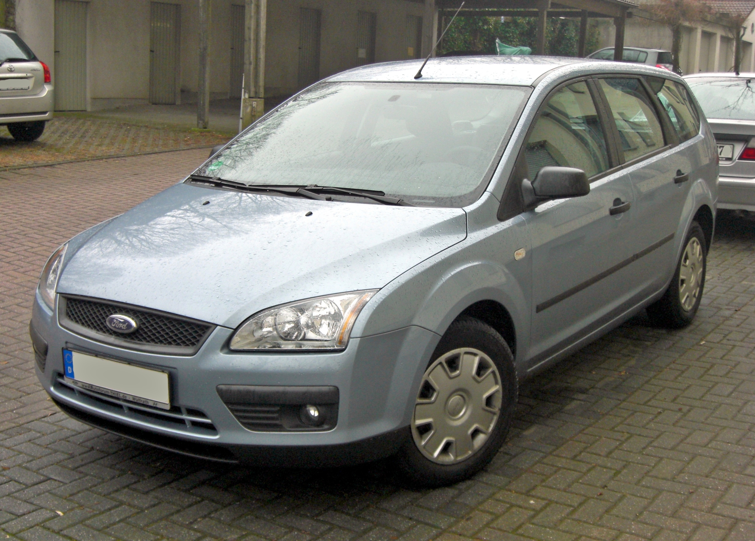 Ford Focus Turnier